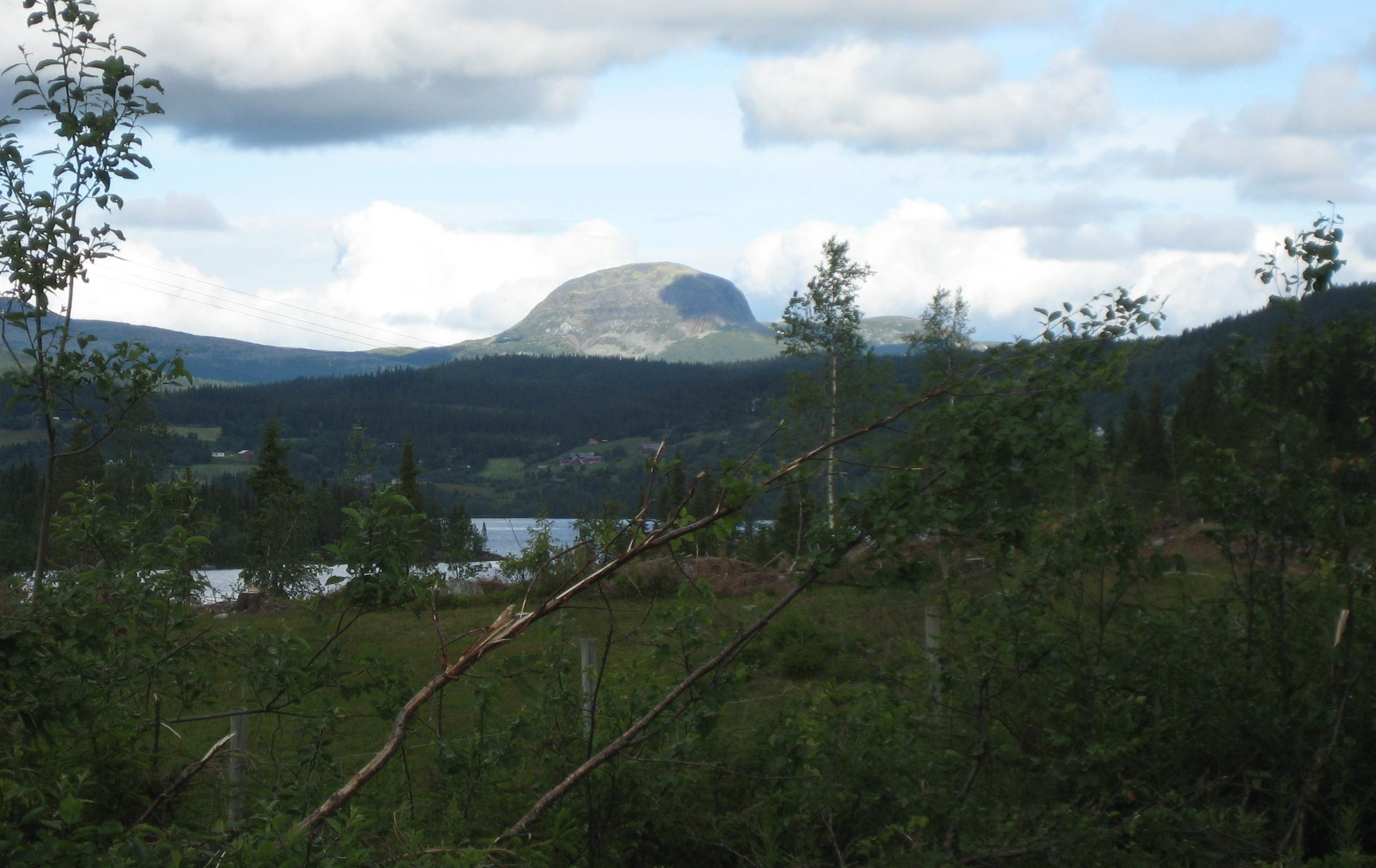 Rundemellen med Steinsetfjorden i forgrunnen